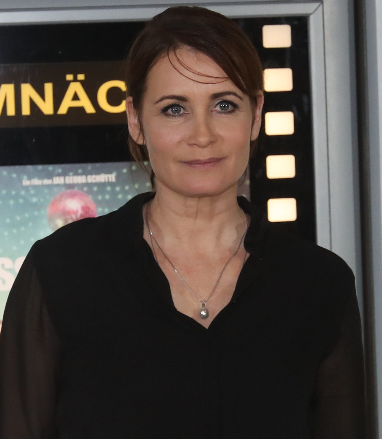 Fototermin zur Premiere des WDR-/ARD-Fernsehfilms „Klassentreffen“ in der Kulturbrauerei in Berlin